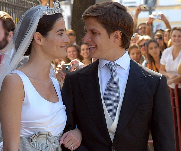 Rosario Domecq Marquez, es la segunda hija de Pedro Luis Domecq Urquijo y Rosario Marquez Amilibia.